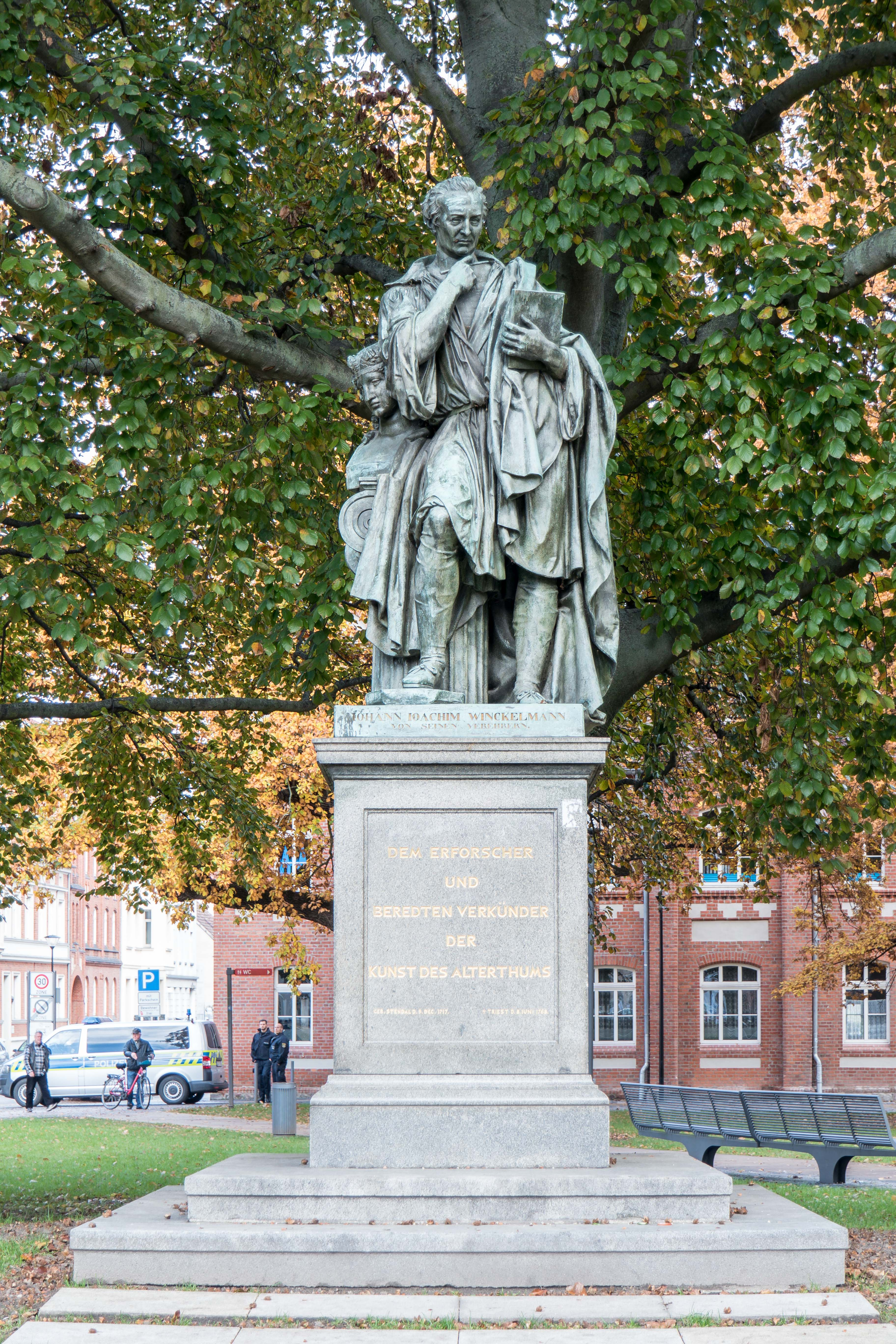 Denkmal für Johann Joachim Winckelmann in Stendal